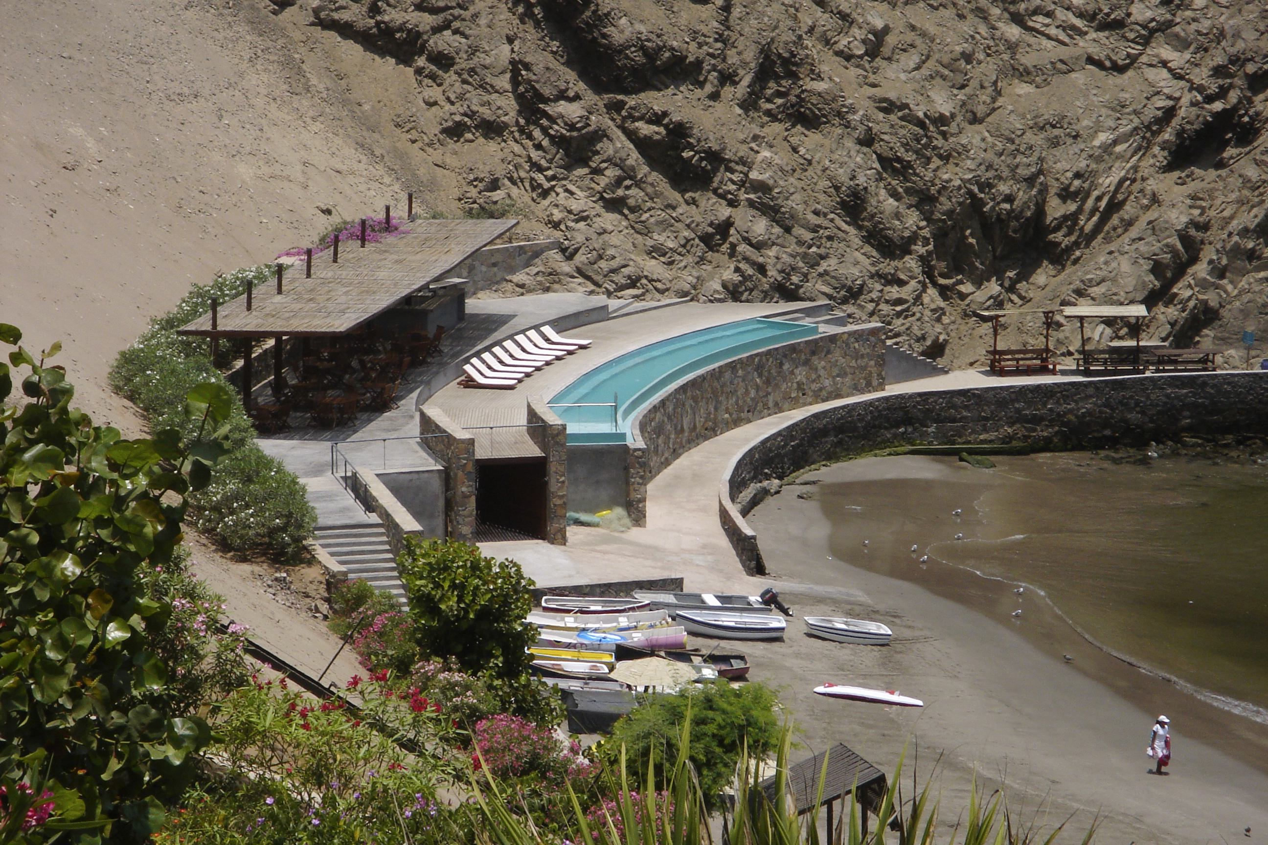 Proyecto visto desde una plataforma superior, Cynthia Watmough y Ruth Alvarado